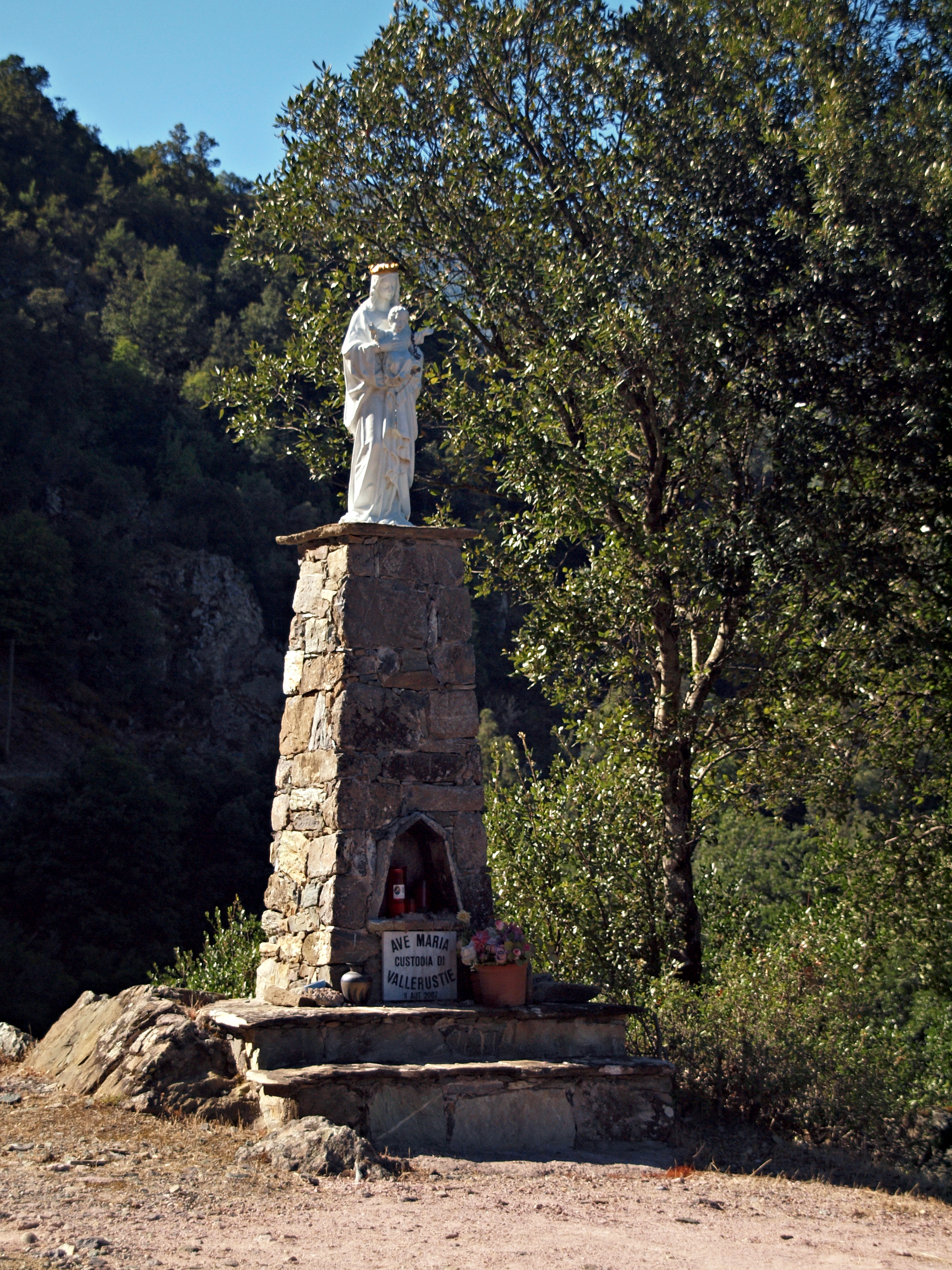 San-Lorenzo (Haute-Corse), Casaluna (Corse) - Vierge à l'enfant en bordure de la route D39 longeant la rivière Casaluna